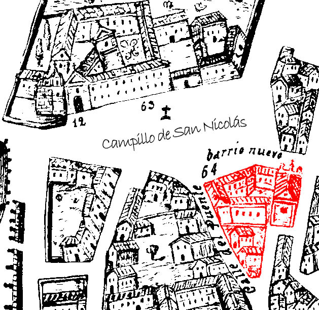 Información parcial del plano de Ventura Seco (1738). Señalado en rojo el edificio ya desaparecido de la Casa Pía de la Aprobación, una institución de finales del siglo dedicada a las mujeres descarriadas de la ciudad de Valladolid en España.